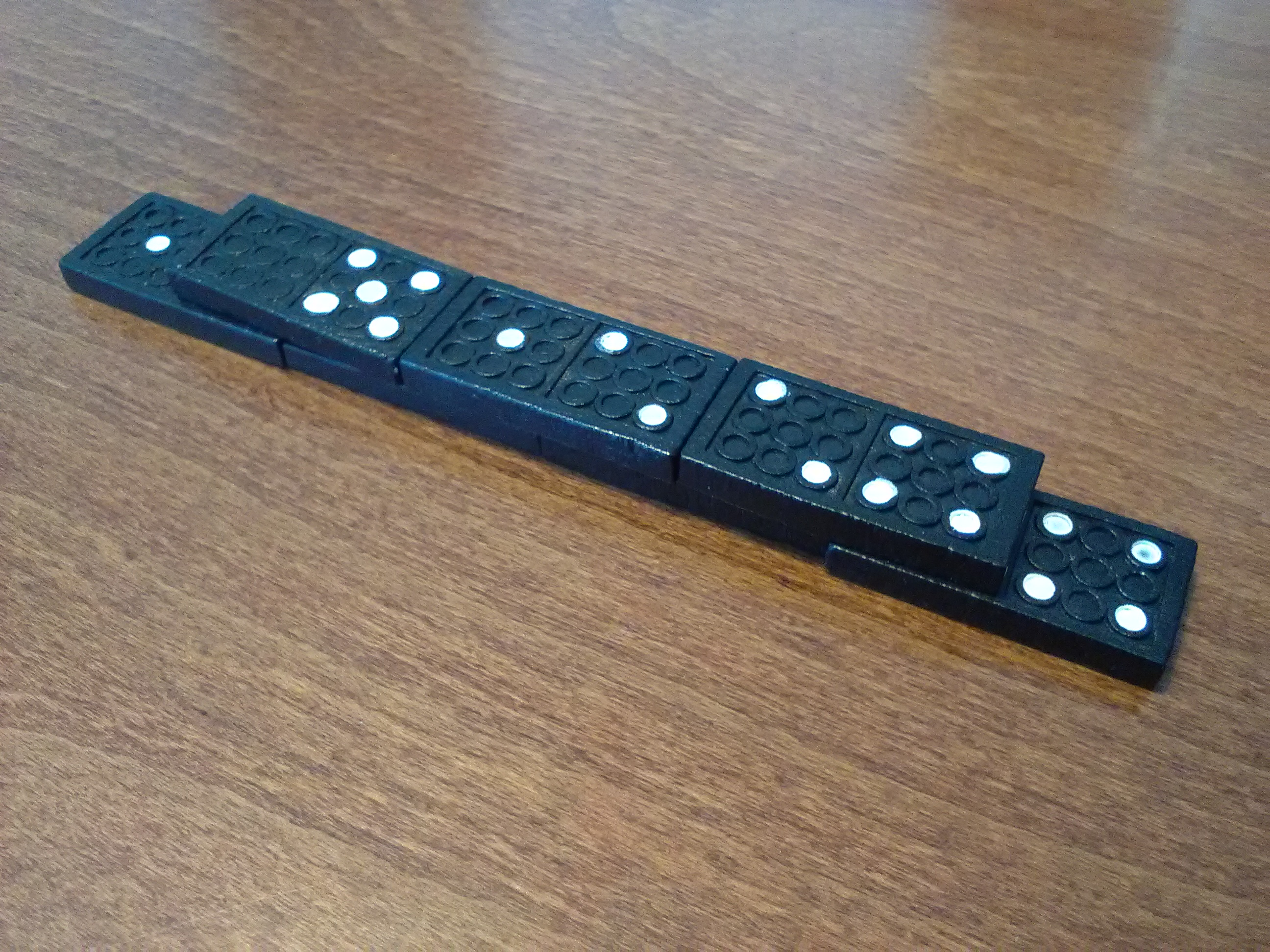 Domino francuskie - przykład ułożenia kamieni.